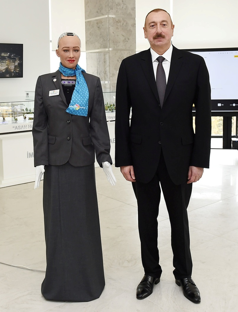 İlham Əliyev və robot Sofiya